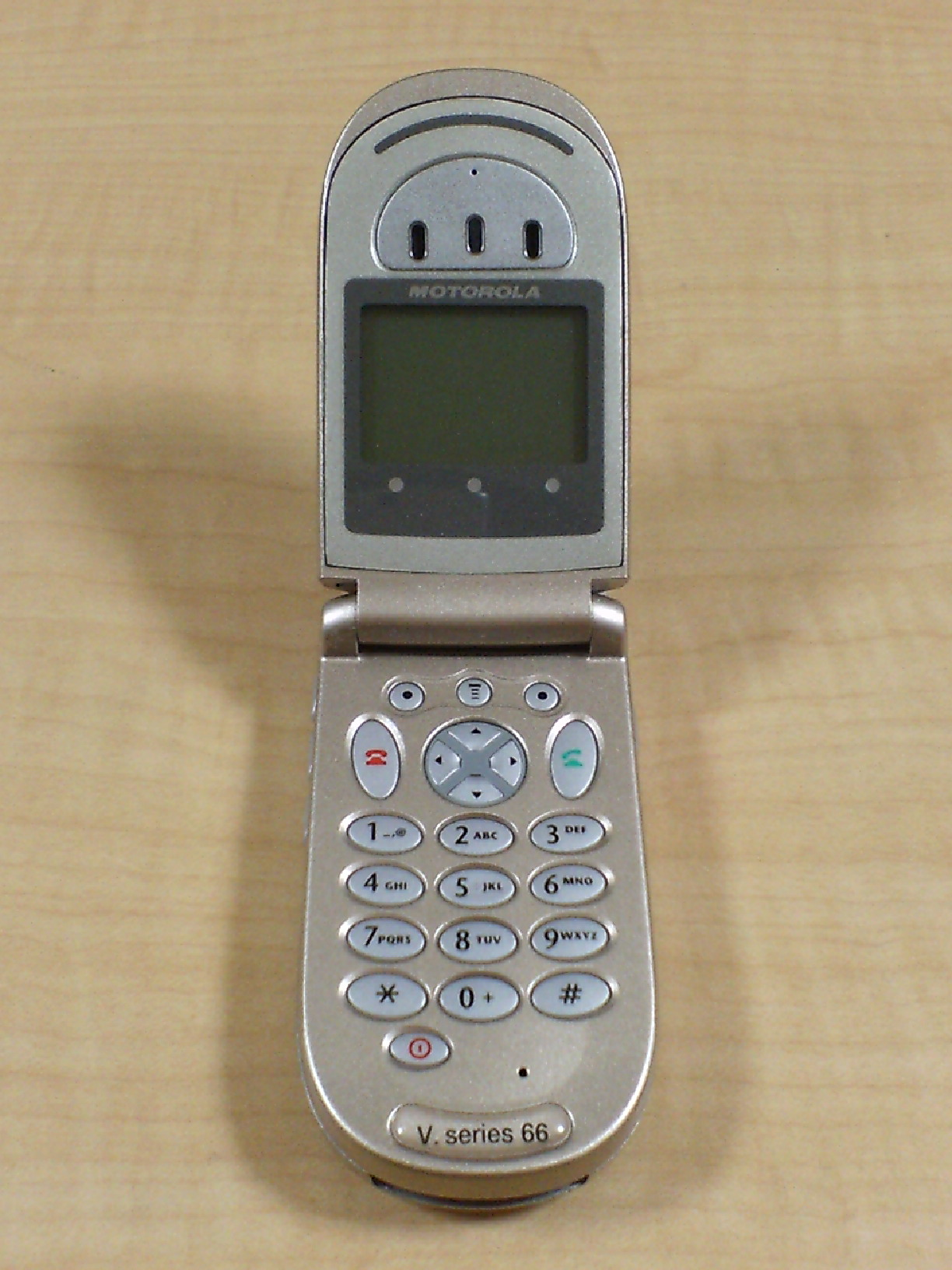 Motorola V66 mobile phone